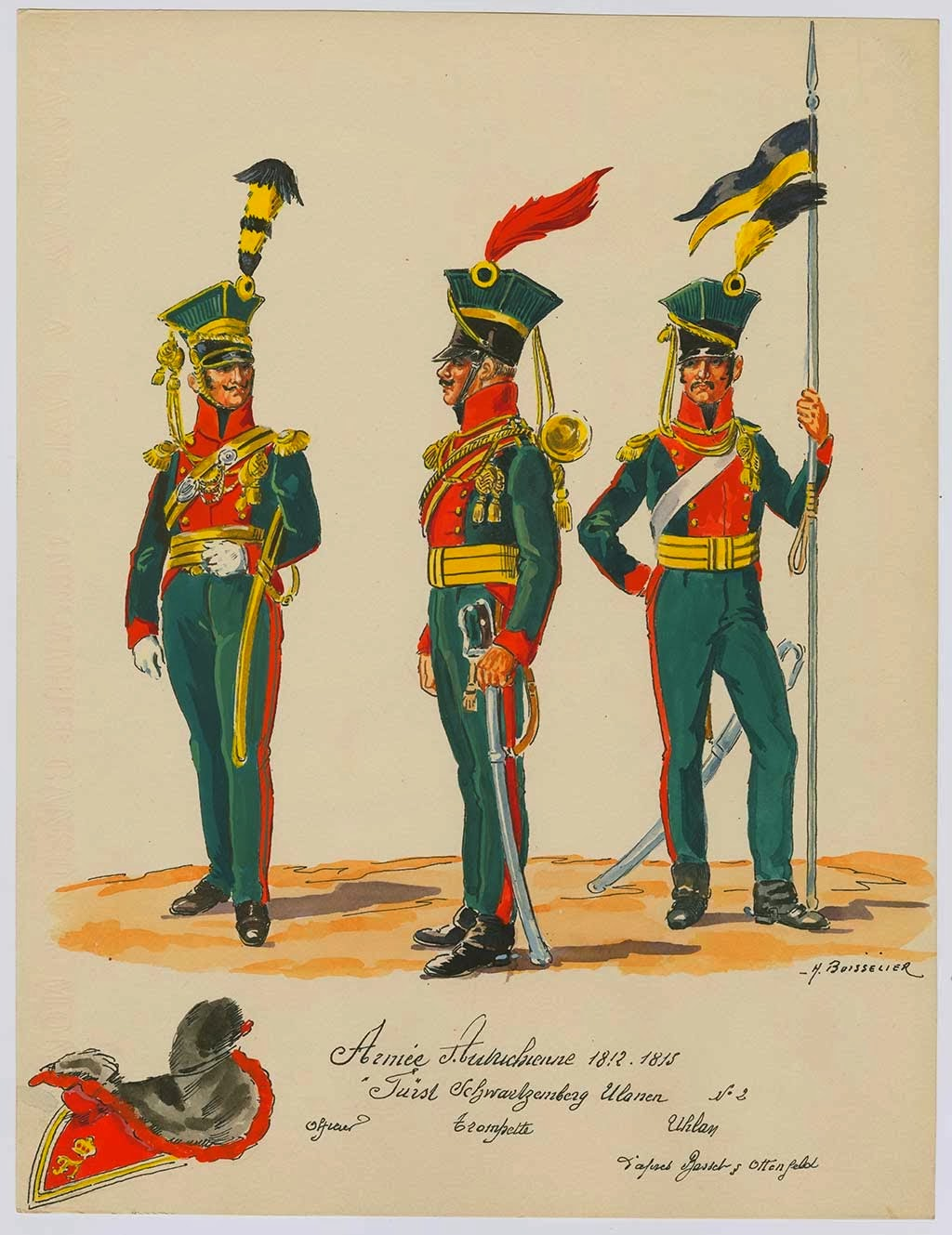 Austria; Furst Schwarzenberg Uhlans, Officer, Trumpeter & Uhlan 1812-15 by H.Boisselier